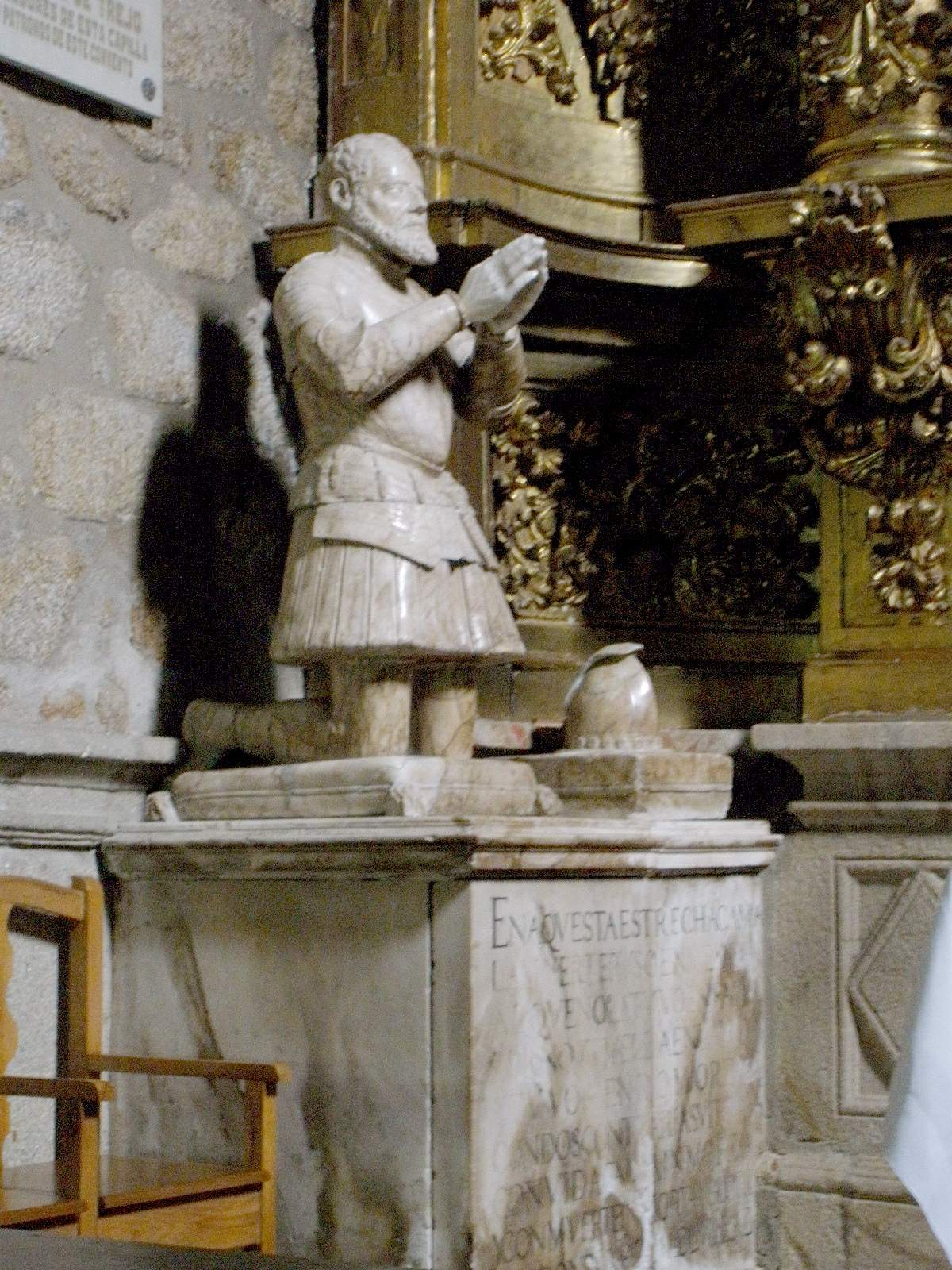 Convento de San Ildefonso (Plasencia, Cáceres)